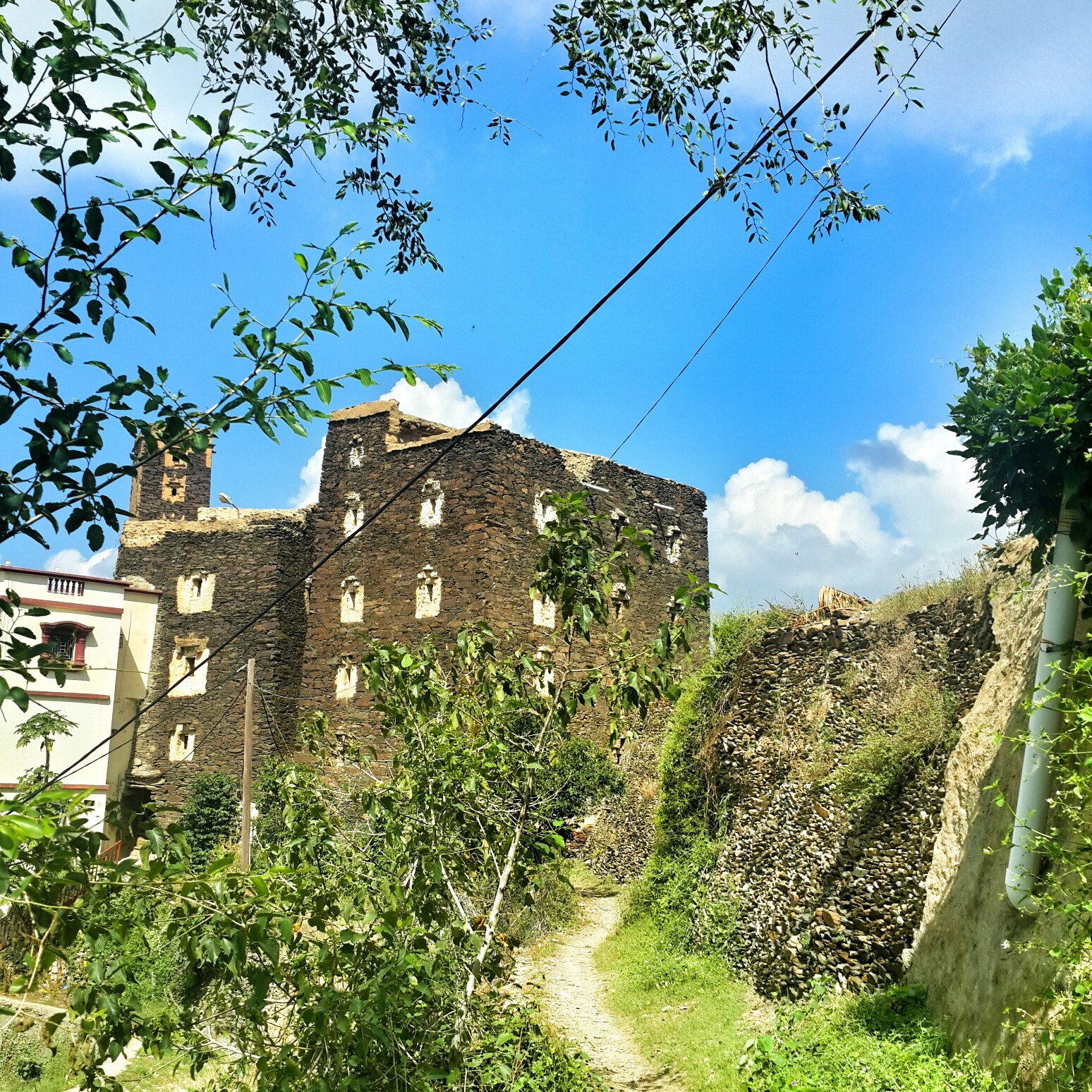 لايوجد